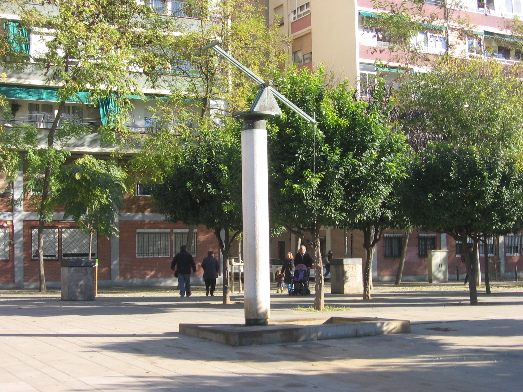 Fuente de Sant Martí de Provençals (1987), de Antoni Roselló, parque de Sant Martí.